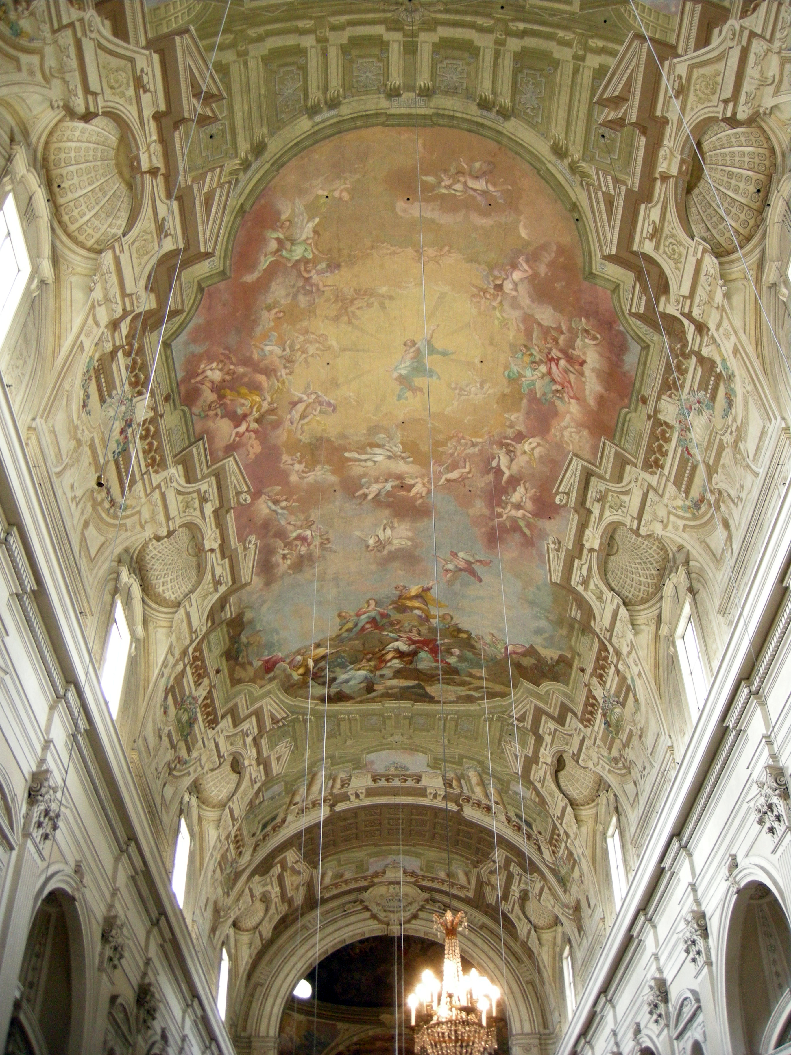 chiese di Firenze